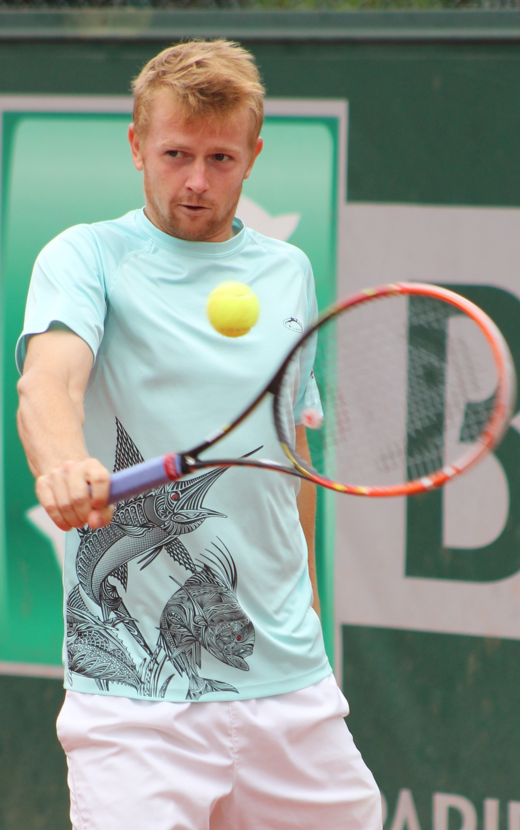 Golubev RG15 (2)